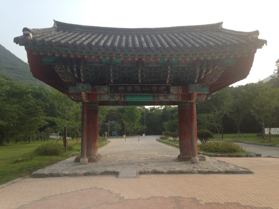 선운사 일주문